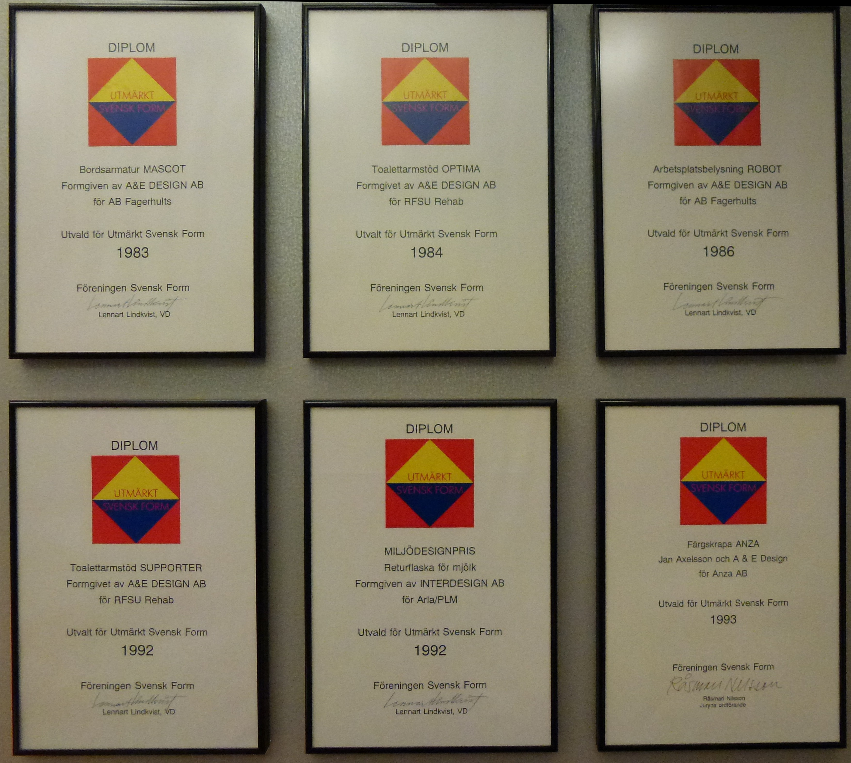 A&E Utmärkt Svensk Form Diplom